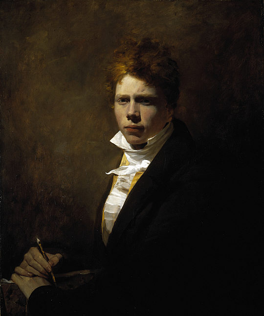 Selbstbildnis David Wilkies im Alter von ca. 20